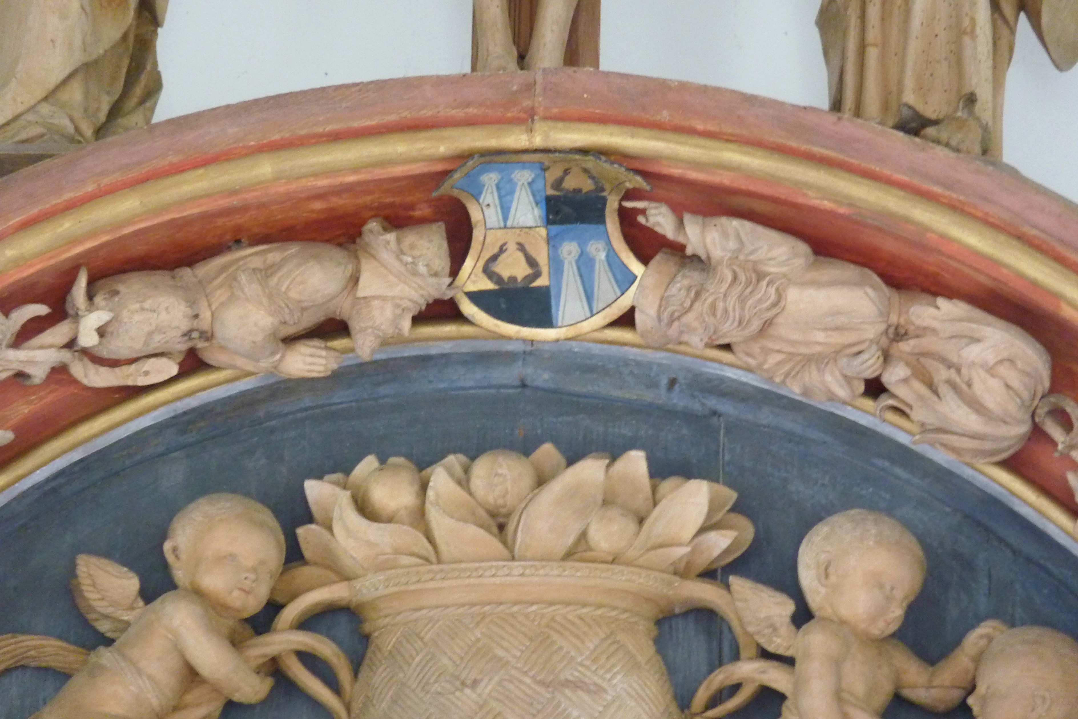 Altar mit der Darstellung der Heiligen Sippe in der katholischen Kapelle Franz Xaver in Bieselbach, einem Ortsteil von Horgau im Landkreis Augsburg (Bayern), aus Lindenholz geschnitzt von dem Bildhauer Daniel Mauch, um 1510. Wappen der Familie Rehlingen